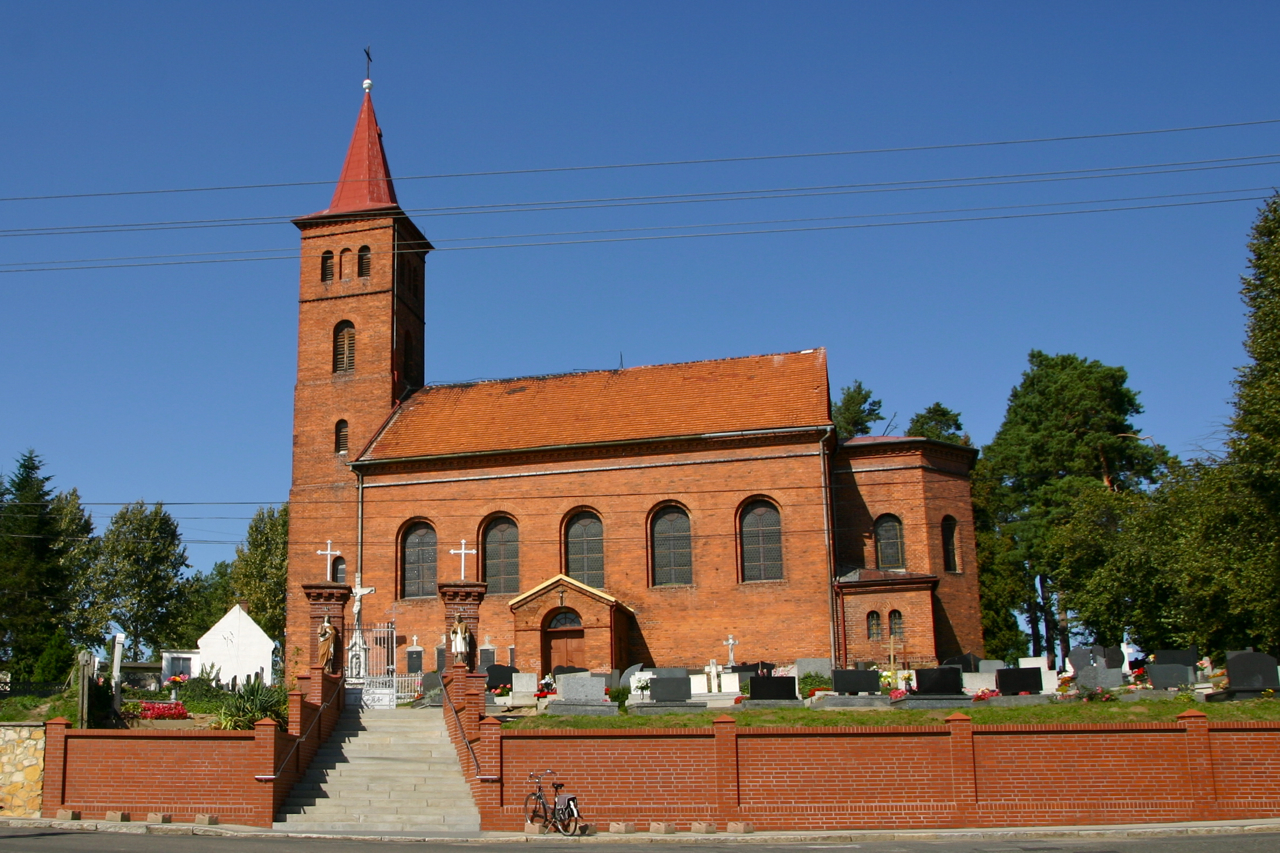 Nowy Browiniec – kościół par. p.w. Wszystkich Świętych, 1845 (zabytek nr 583/59 z 1.07.1959).